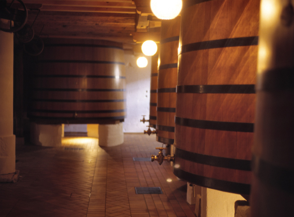 Cuves en bois / Gärbehälter aus Eichenholz, Château Figeac, Saint-Emilion, France